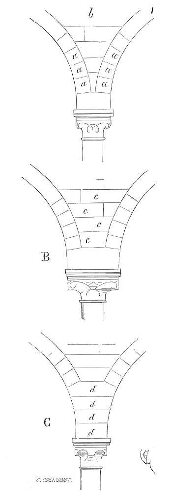 ... On conçoit aisément que lorsque plusieurs arcs viennent reposer sur la tête d'une pile dont la section n'est pas considérable, les lits inclinés des claveaux a (fig. 1) ne présentent pas une assiette propre à recevoir une charge supérieure b. Celle-ci tend à faire glisser ces claveaux ou à les écraser, parce qu'ils présentent leur angle d'extrados sous son action verticale. Alors (voyez en B), dans les constructions bien entendues, ou on laisse entre l'extrados de ces claveaux des assises horizontales c épousant la courbure de l'arc, ou, si la place ne le permet pas, on pose une série de sommiers d (voy. en C) avec lits horizontaux ...